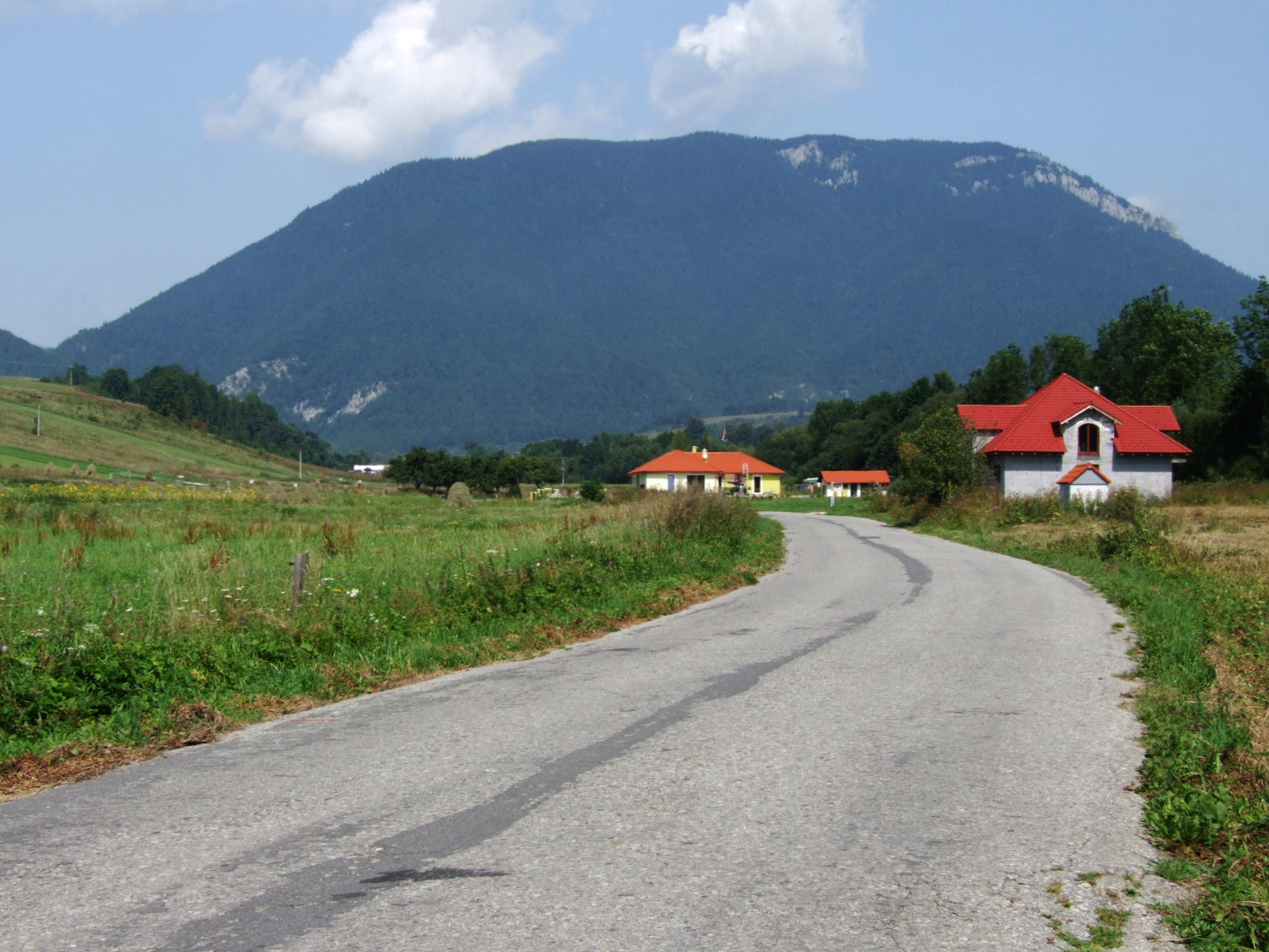 Prosečné (Chočské vrchy). Widok z drogi do miejscowości Prosiek